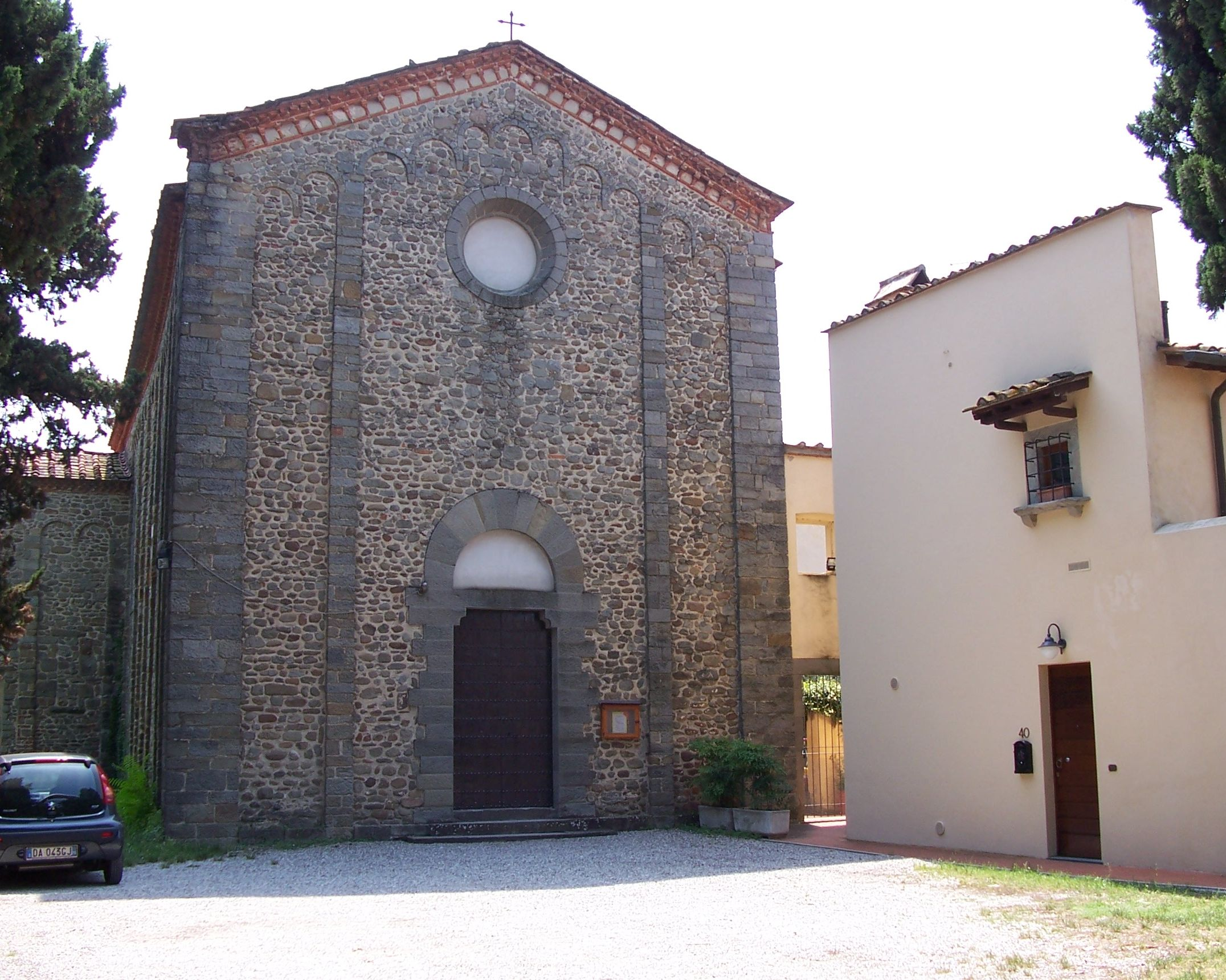 Badia, Abbazia di San Salvatore in Agna, Montale PT